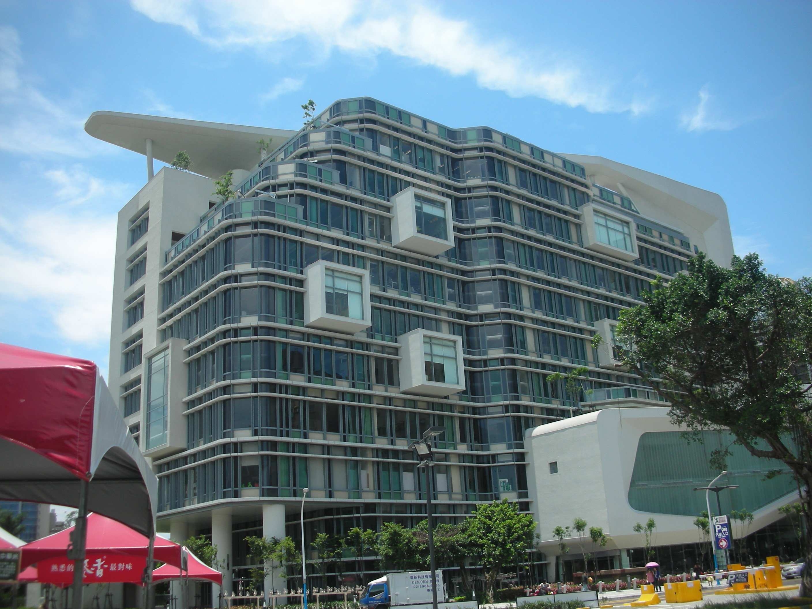 新北市立圖書館新總館，位於板橋區貴興路，2015年5月落成啟用